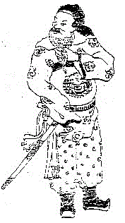 Minh Đô Vương Trịnh Doanh